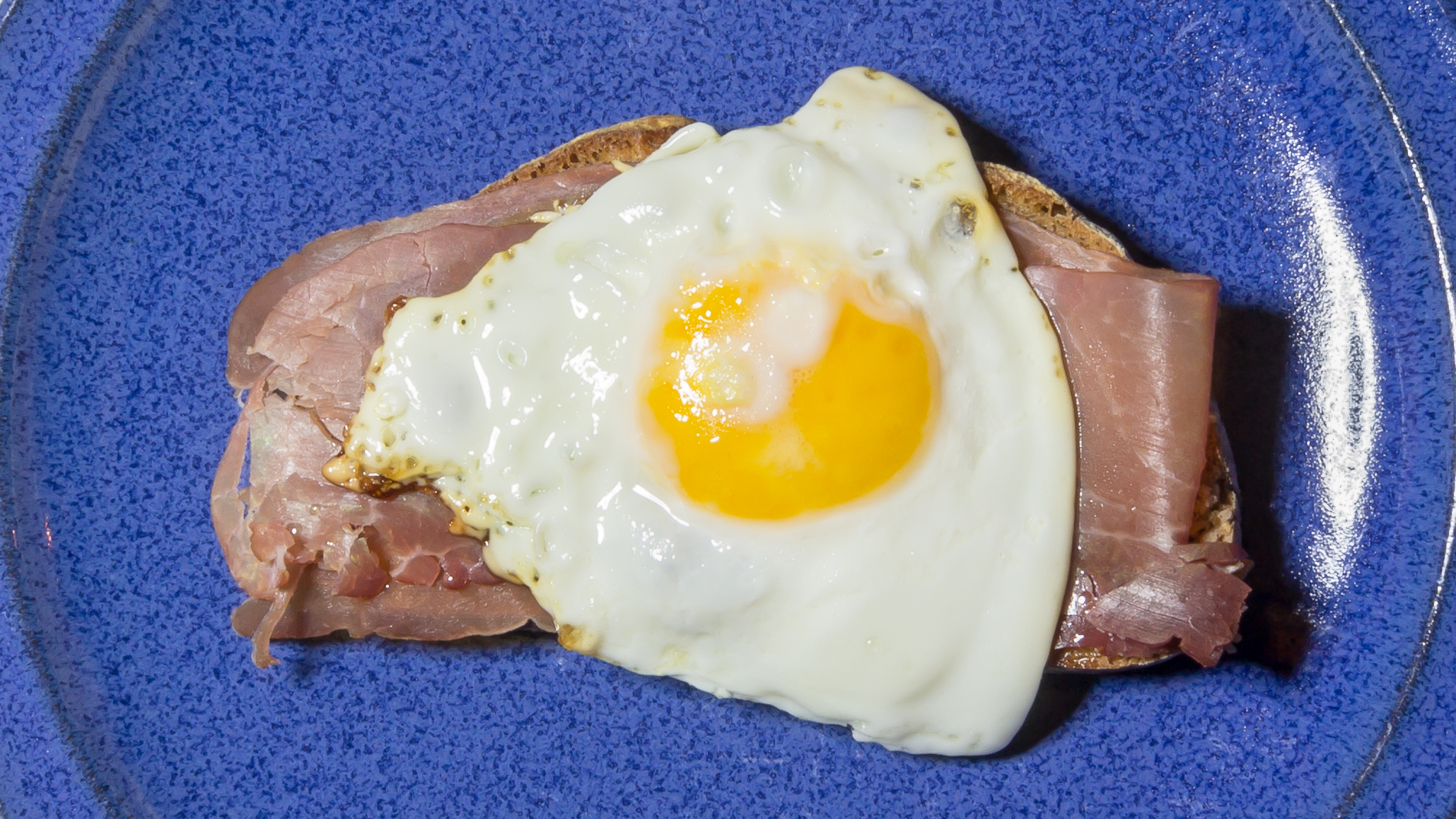 Strammer Max auf blauem Teller, Ausschnitt